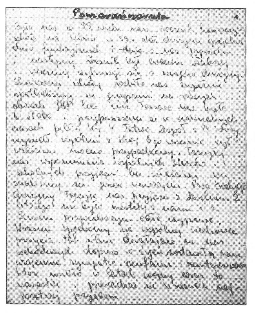 Pierwsza strona relacji Tadeusza Zawadzkiego spisanej po akcji pod Arsenałem